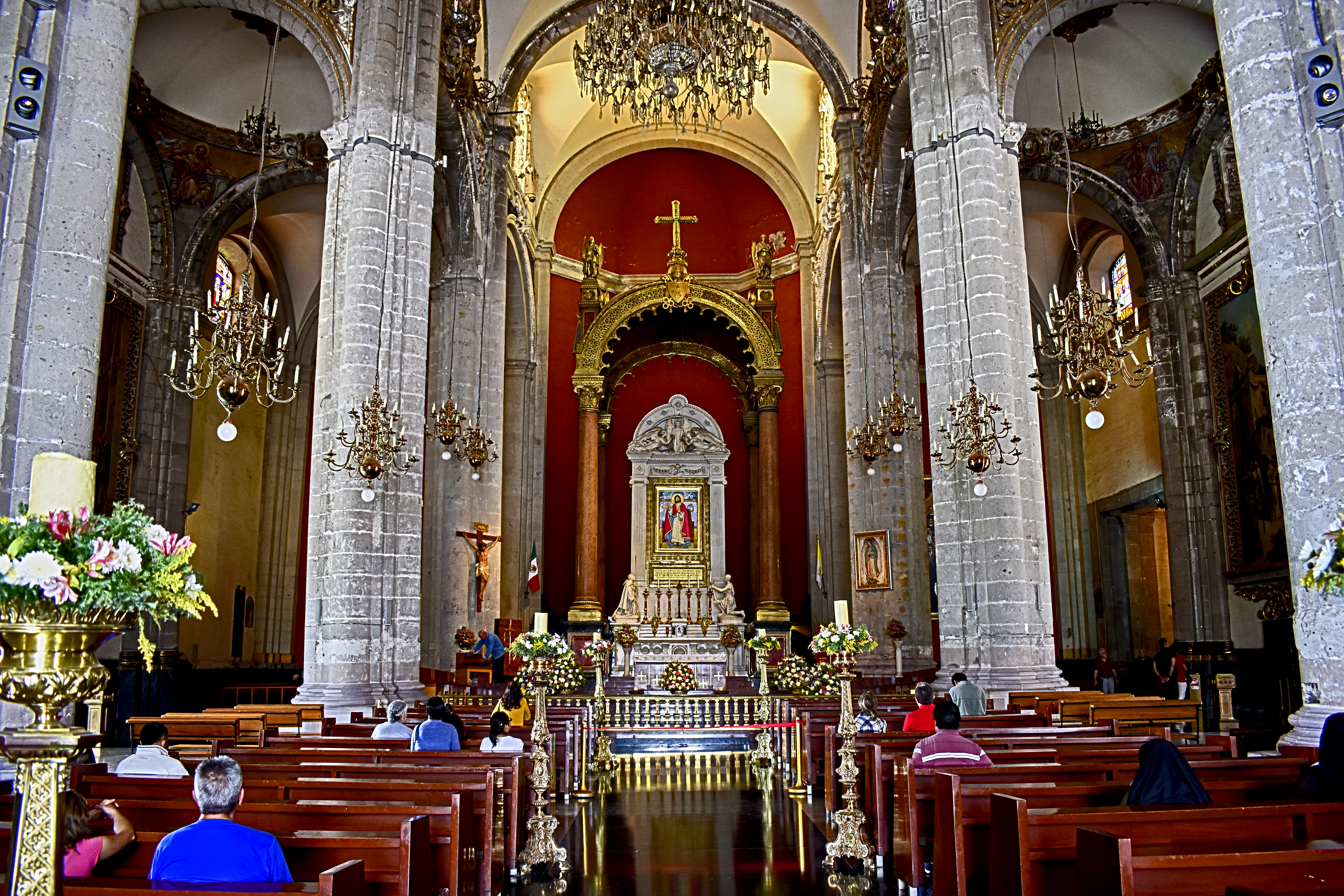 Vista interior de la Antigua Basílica de Guadalupe, Conjunto Villa de Guadalupe